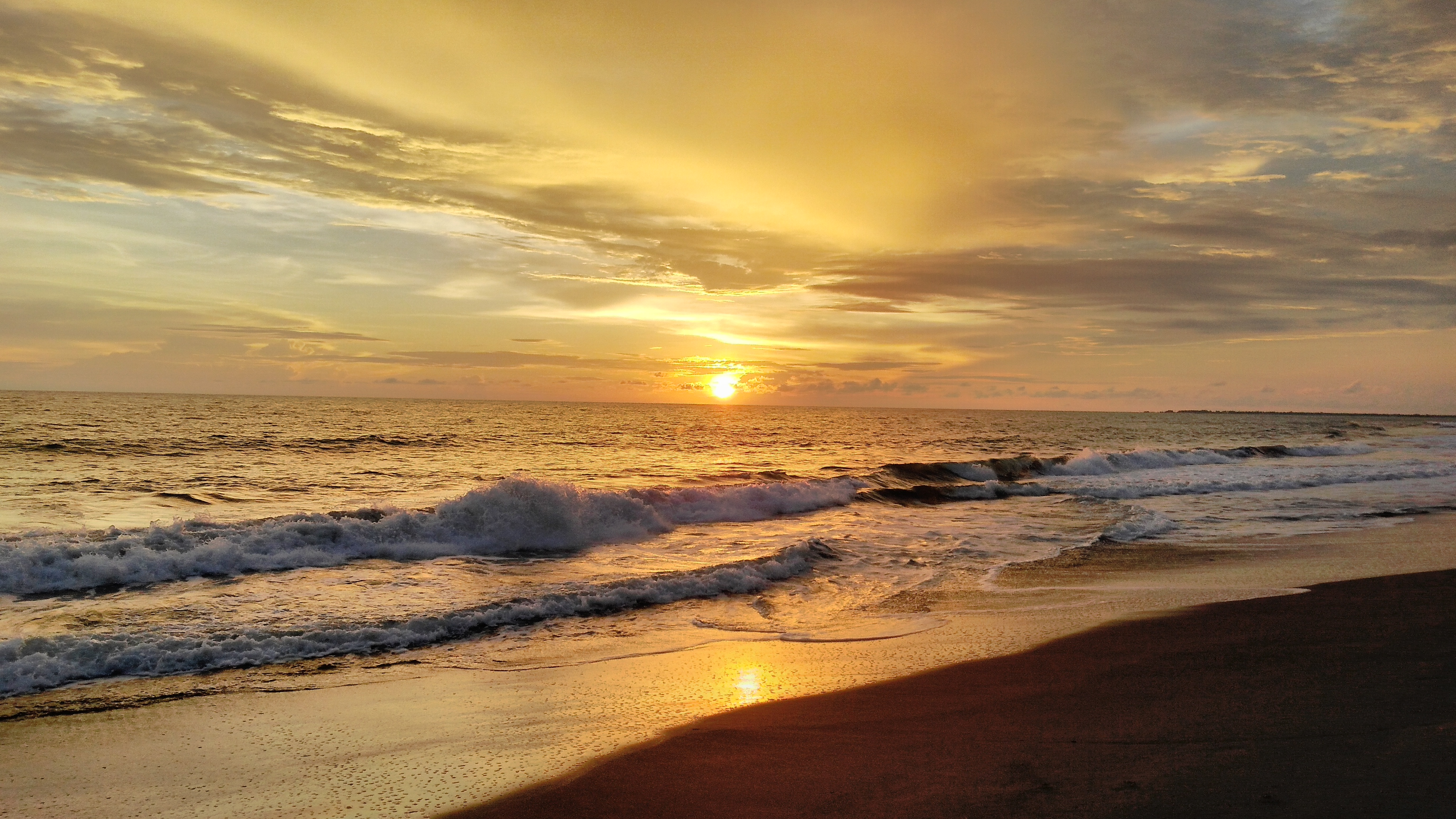 Pemandangan menarik saat matahari terbenam di pantai meulaboh